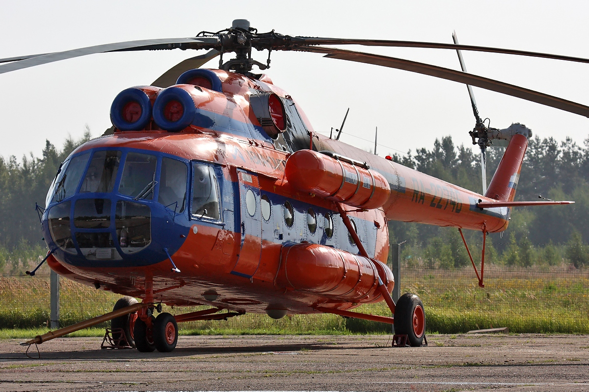 Konvers-Avia Mil Mi-8T